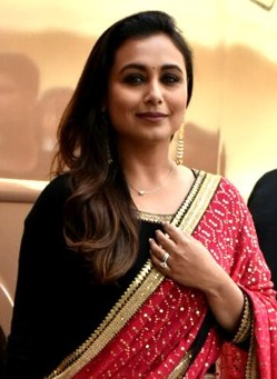 Rani Mukerji mempromosikan Hichki di set dari Dance India Dance, 2018